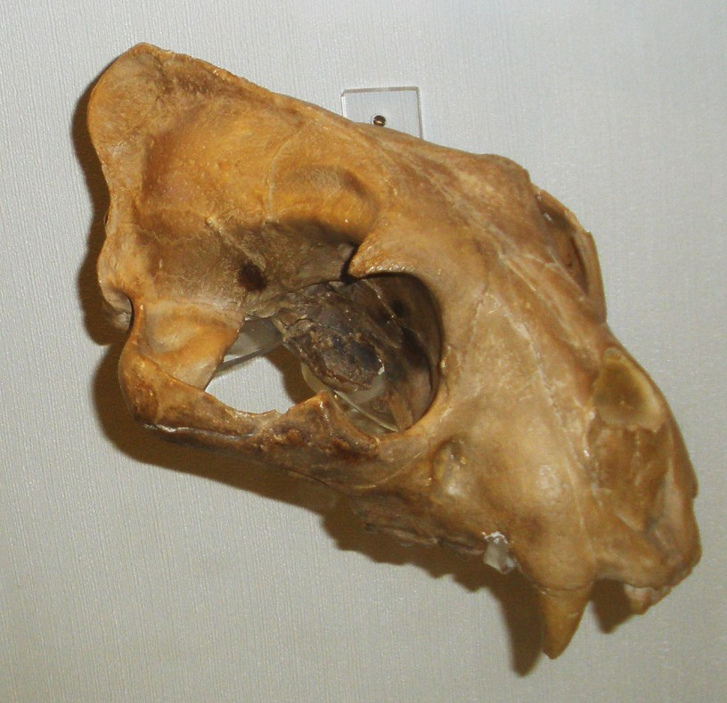 Fossil of Panthera, an extinct mammal- Took the picture at Museo di Paleontologia di Firenze